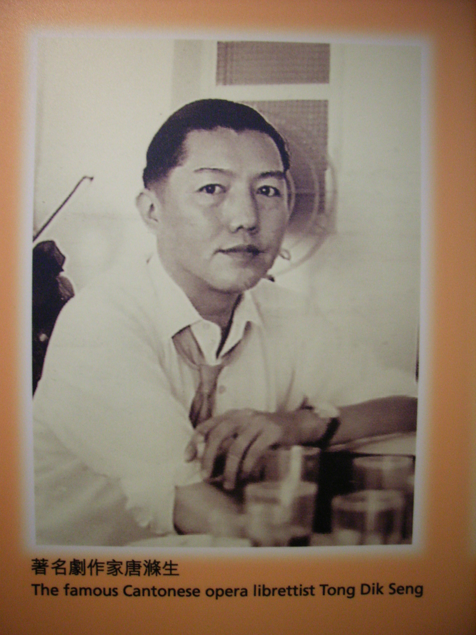 香港戲曲歷史文物展 2006年2月28日至6月30日